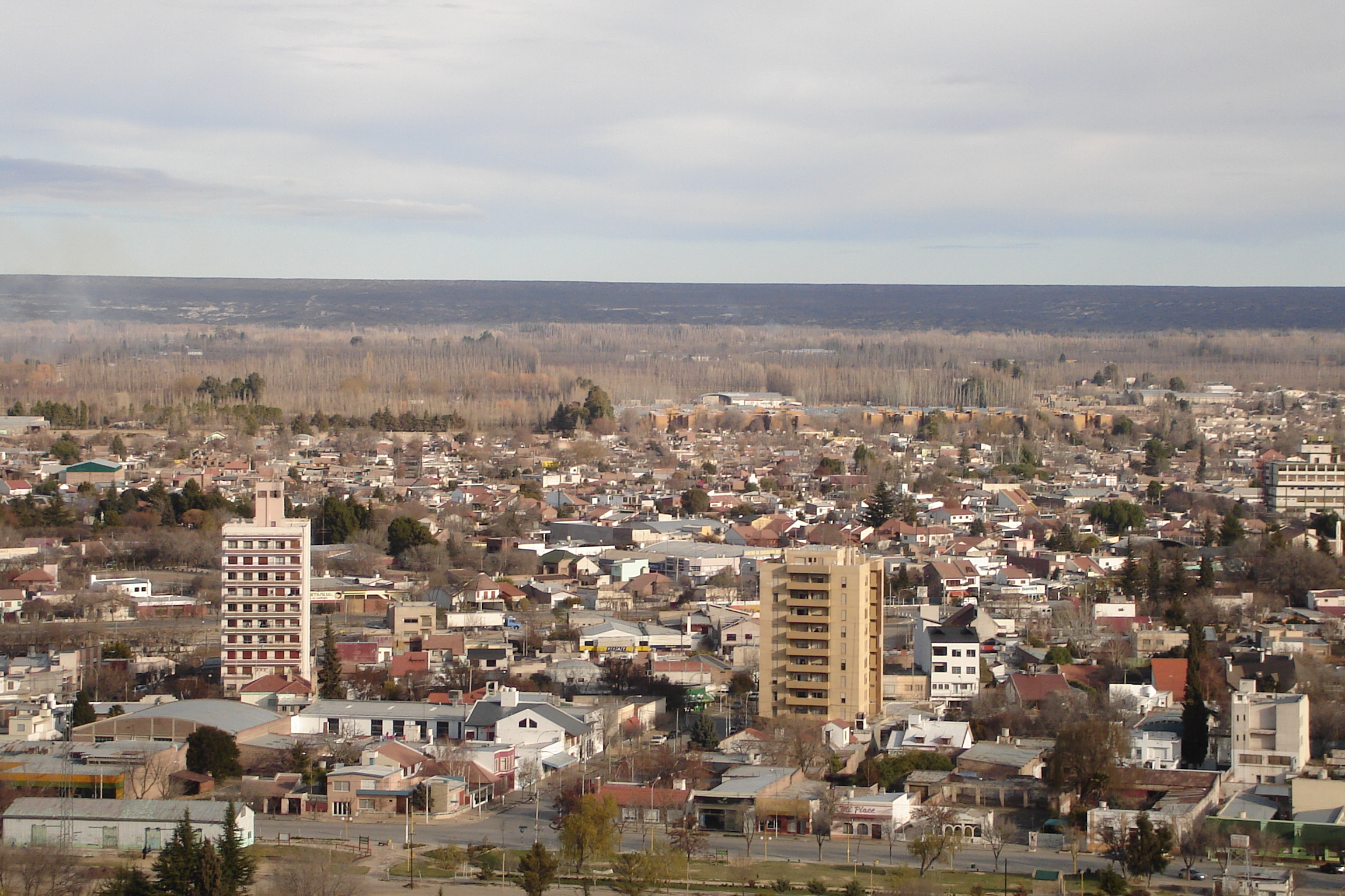 Villa Regina, Argentina